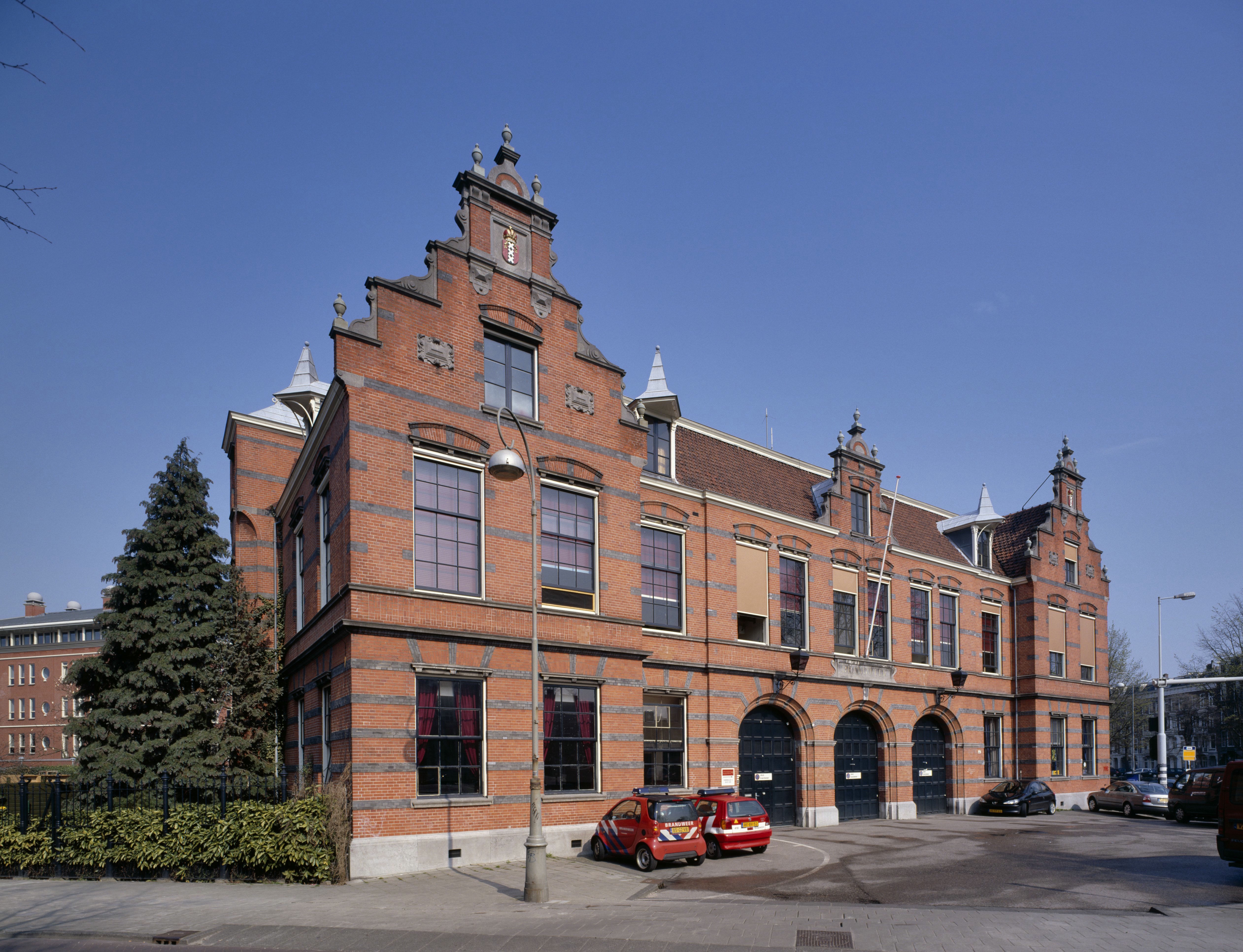 Brandweerkazerne: Rode bakstenen voorgevel met drie rondboogingangen (opmerking: Gefotografeerd voor Monumenten In Nederland Noord-Holland)